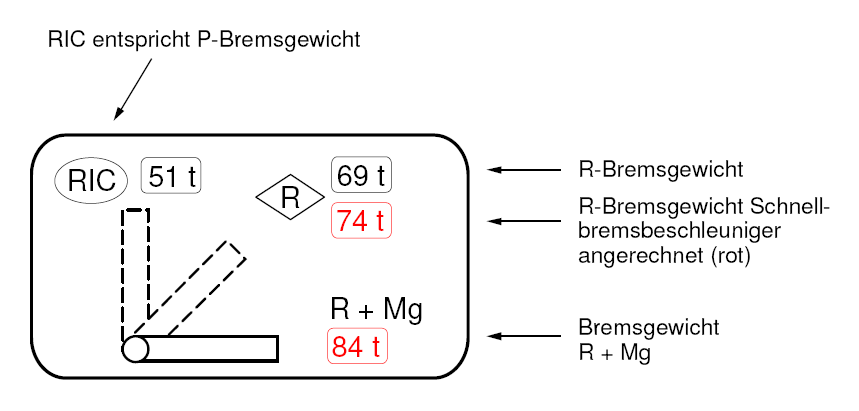 Bremsanschrift eines Reisezugwagens mit Umstellvorrichtung